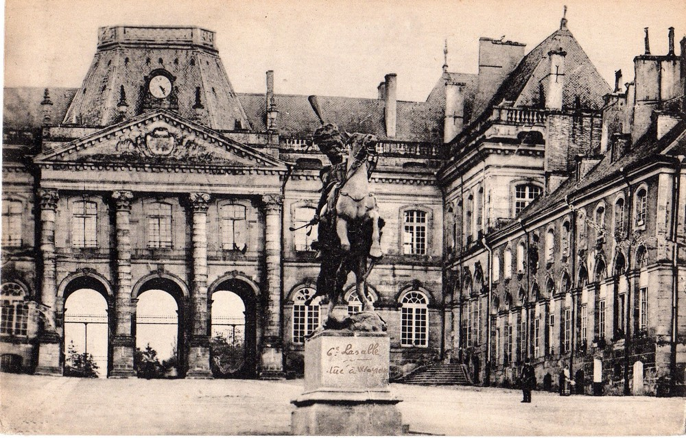 Château de Lunéville et statue du Général Lasalle.